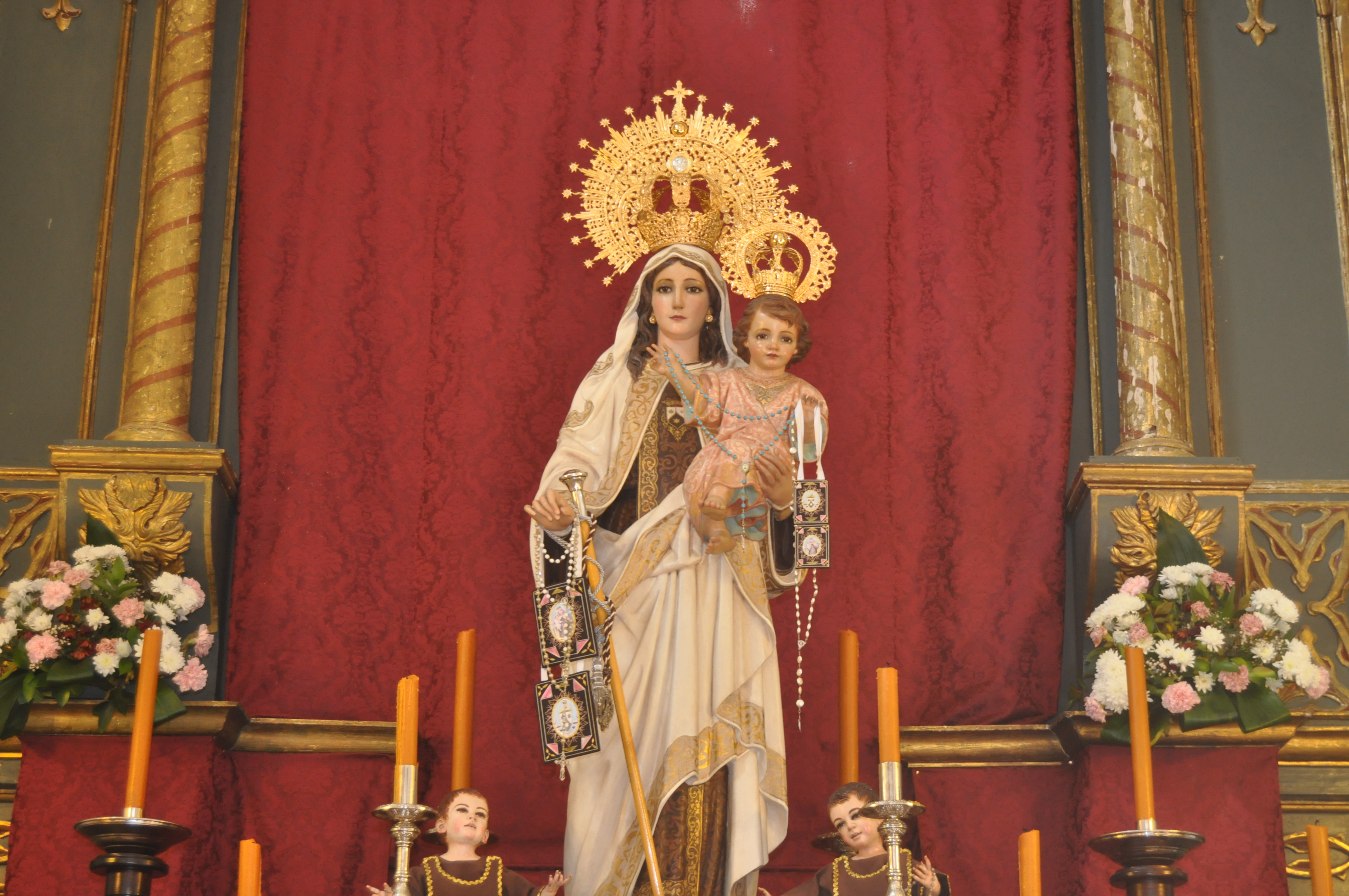 Nuestra Señora la Virgen del Carmen patrona y alcaldesa perpetua de Cuevas de San Marcos (Málaga)